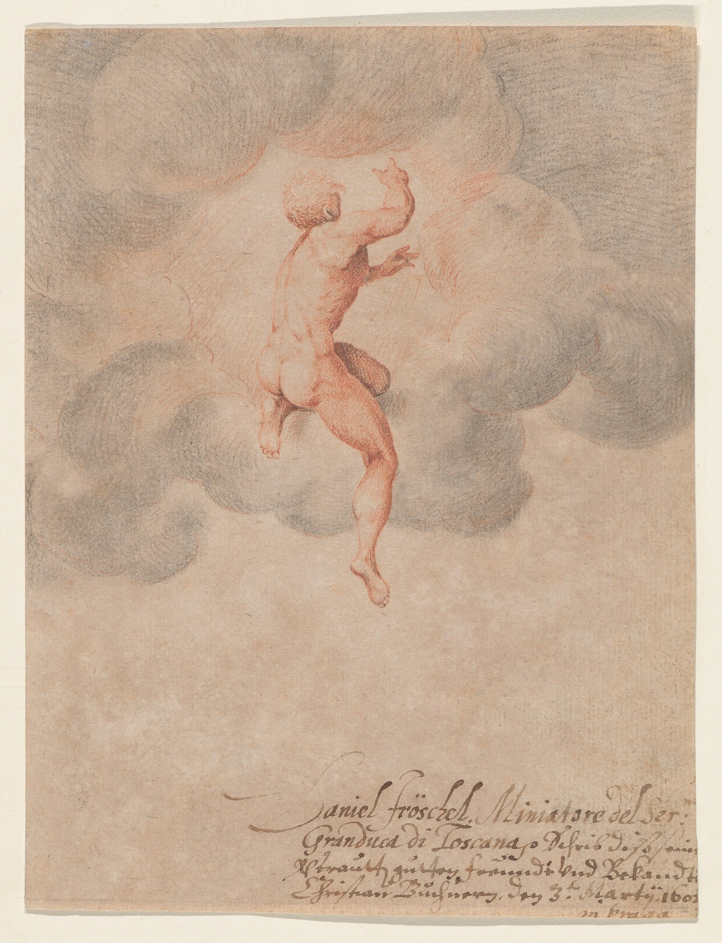 Drawing; Drawings